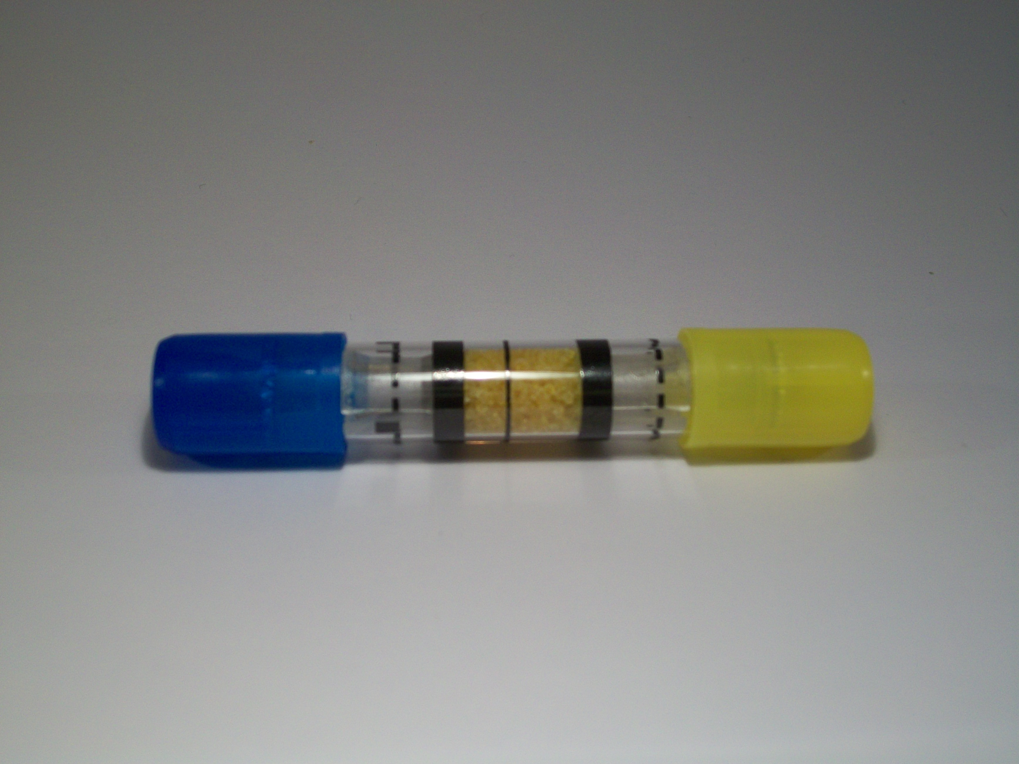 Blaaspijpje met kaliumdichromaat om ethanol (alcohol) in de adem aan te tonen